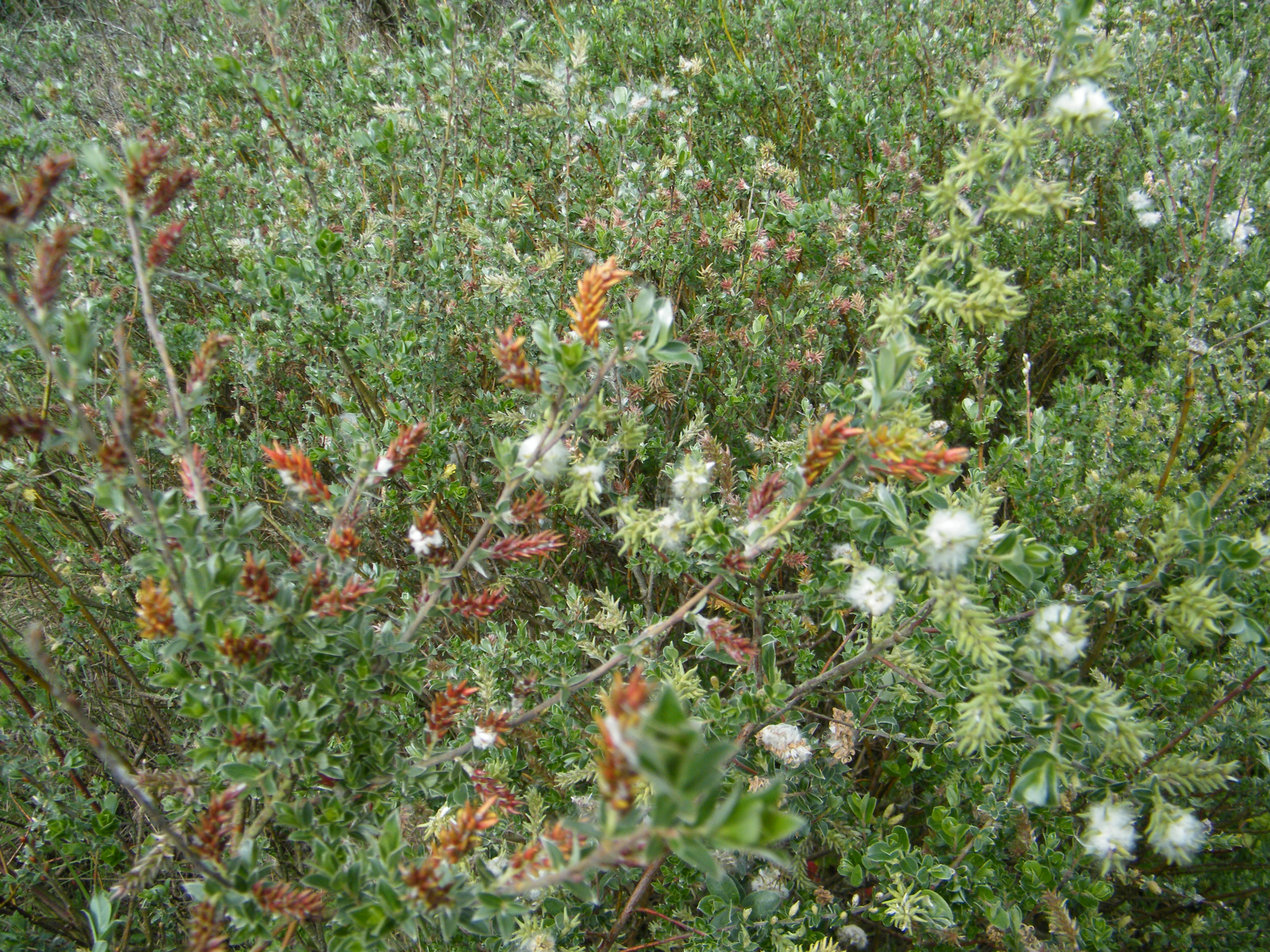 Chatons femelles de Salix repens, couleurs variées sur un même pied, étang de pêche, marais communal, Le Crotoy. Somme, Fr.